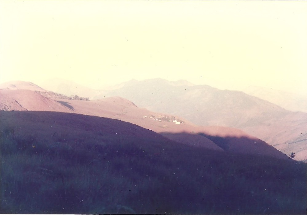 Lomas de Hierro en las afueras de Las Tejerías, municipio Santos Michelena del estado Aragua, Venezuela.